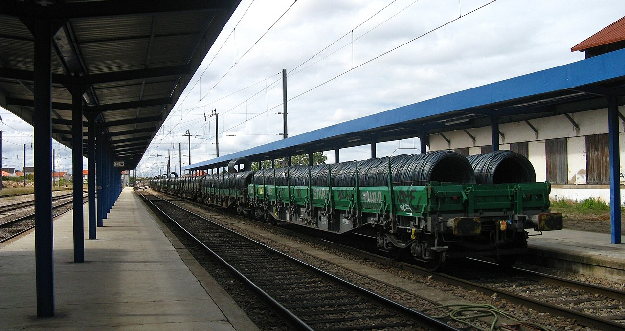 Isto é... falta a locomotiva... Vilar Formoso